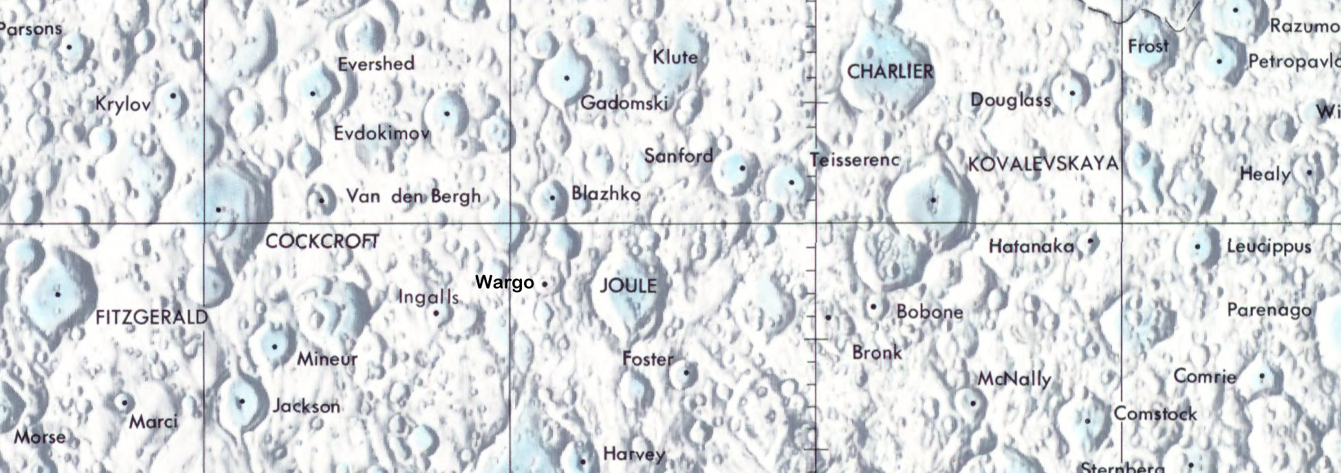 Cráter lunar Wargo. Localización. (Lunar Chart LPC1. Second Edition)